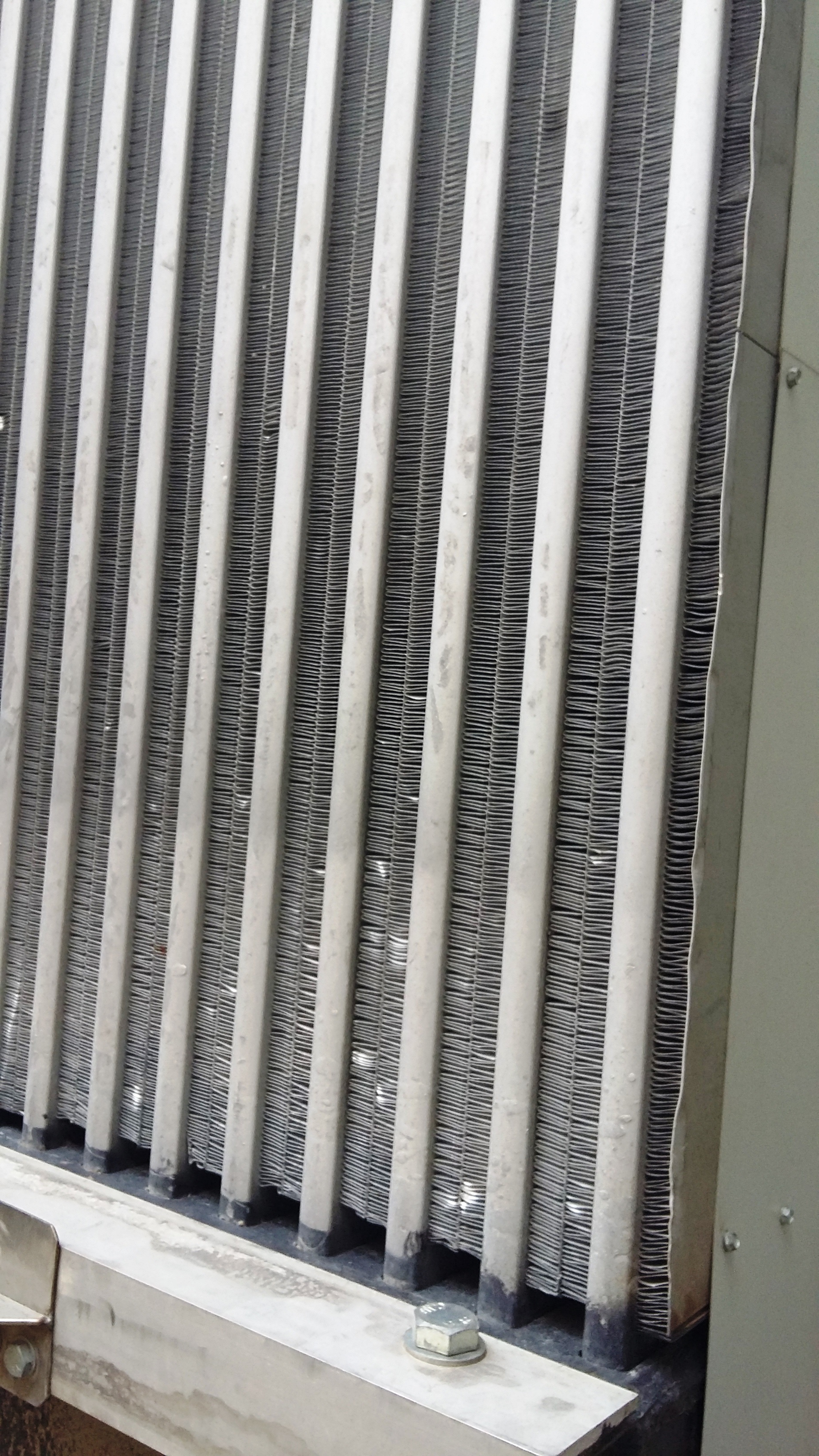 Faisceau aérocondenseur, composé de tubes rectangulaires parallèles séparés par des ailettes. Les tube contiennent de la vapeur, et le faisceau est traversé par de l'air frais. Ce dispositif permet de faire condenser la vapeur. Ce type de faisceau est souvent disposé en forme de A pour former des Aérocondenseurs.